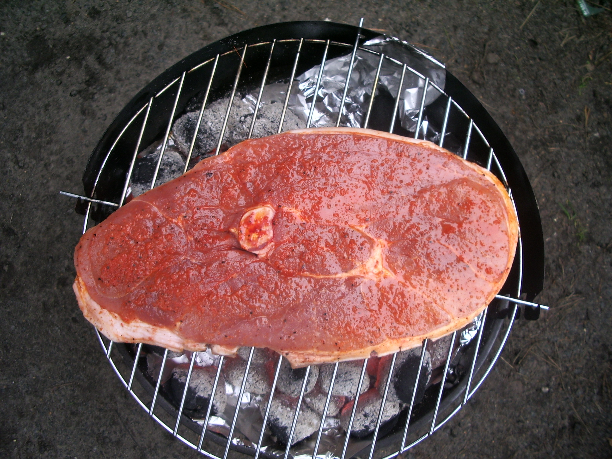 Grillfleisch ca. 1,1 kg auf dem Grill